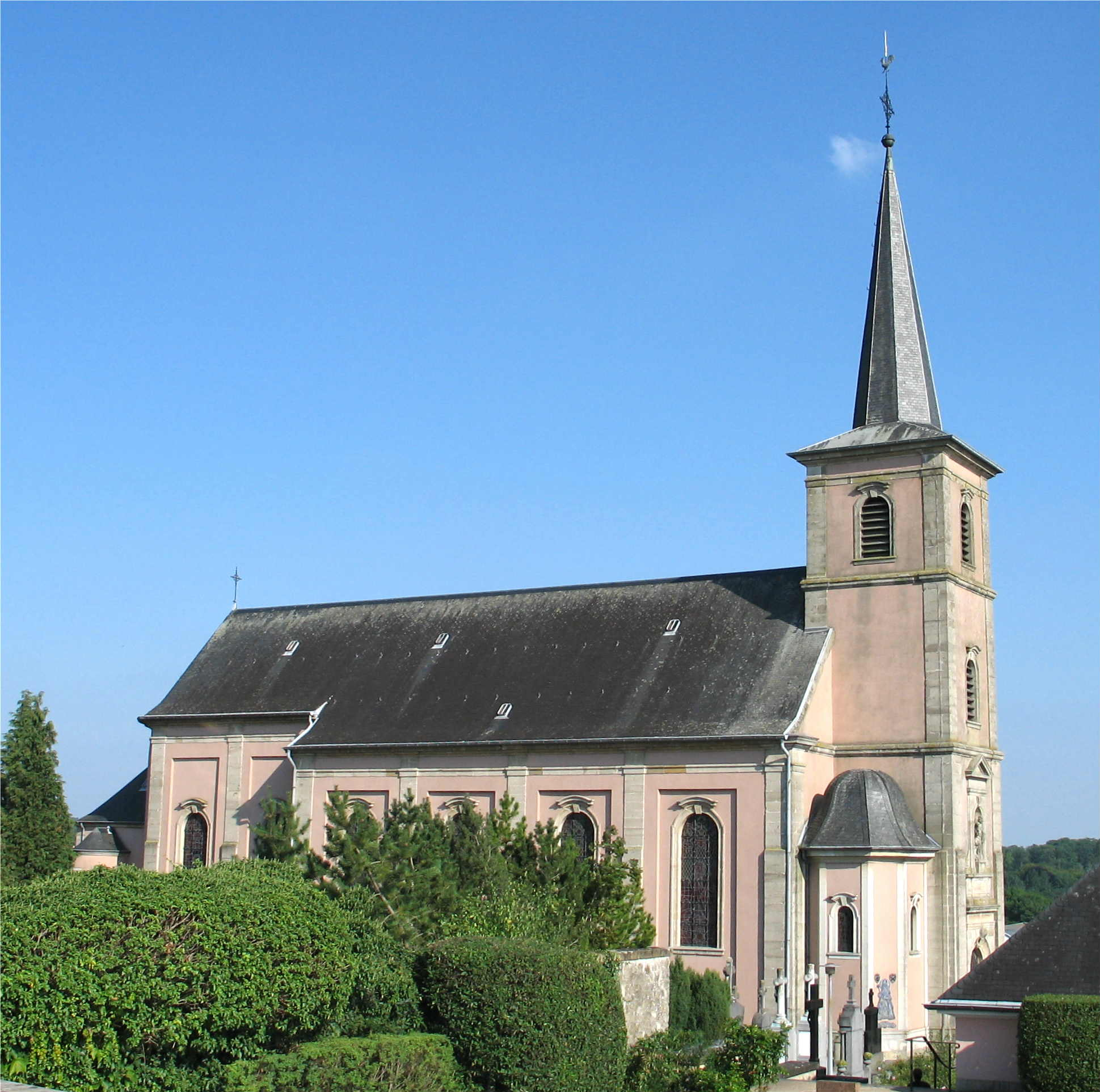 L'église de Mondorf-les-Bains (Luxembourg)